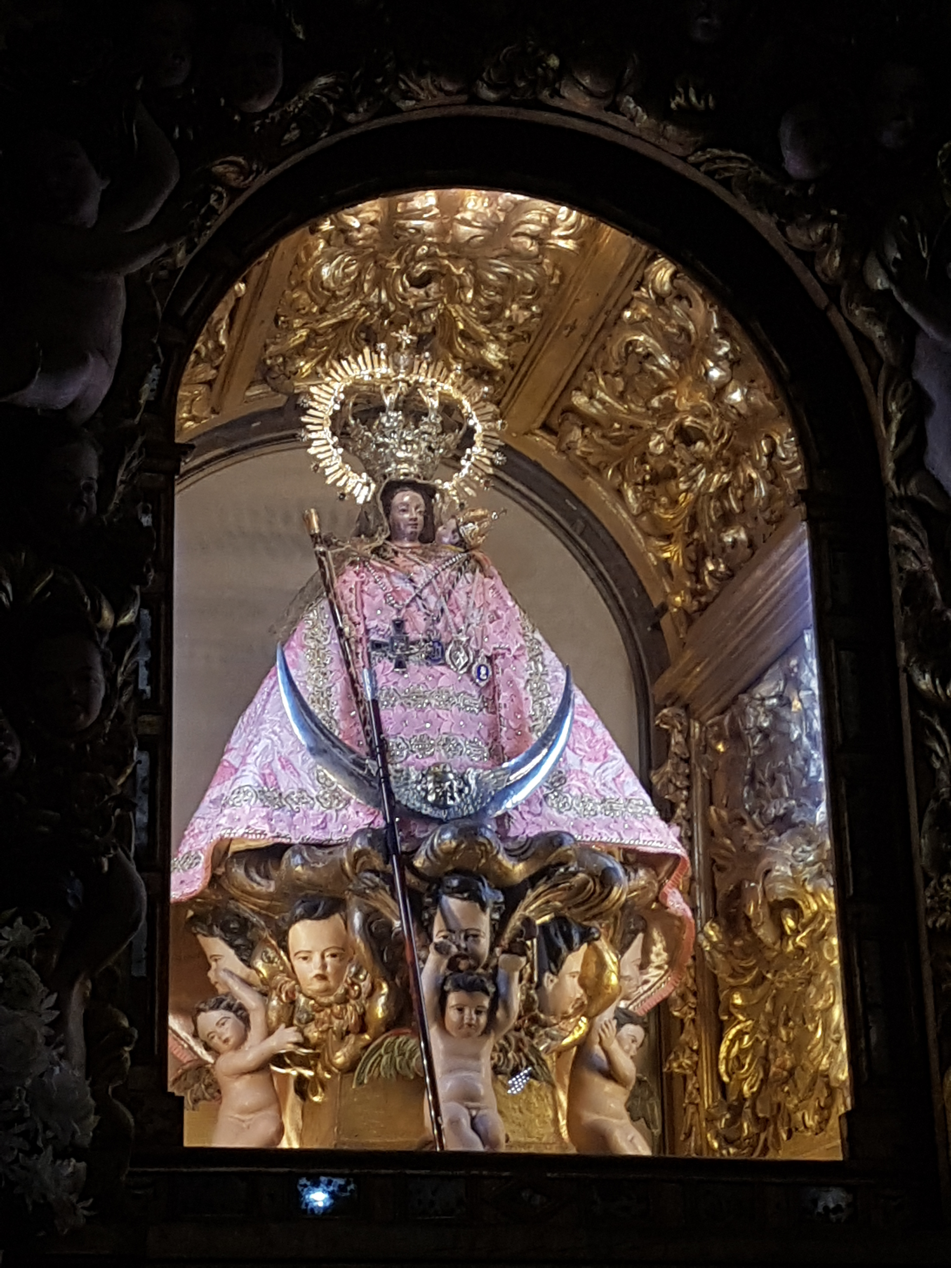 A santa padroeira de Cáceres no vestiário do seu santuário.